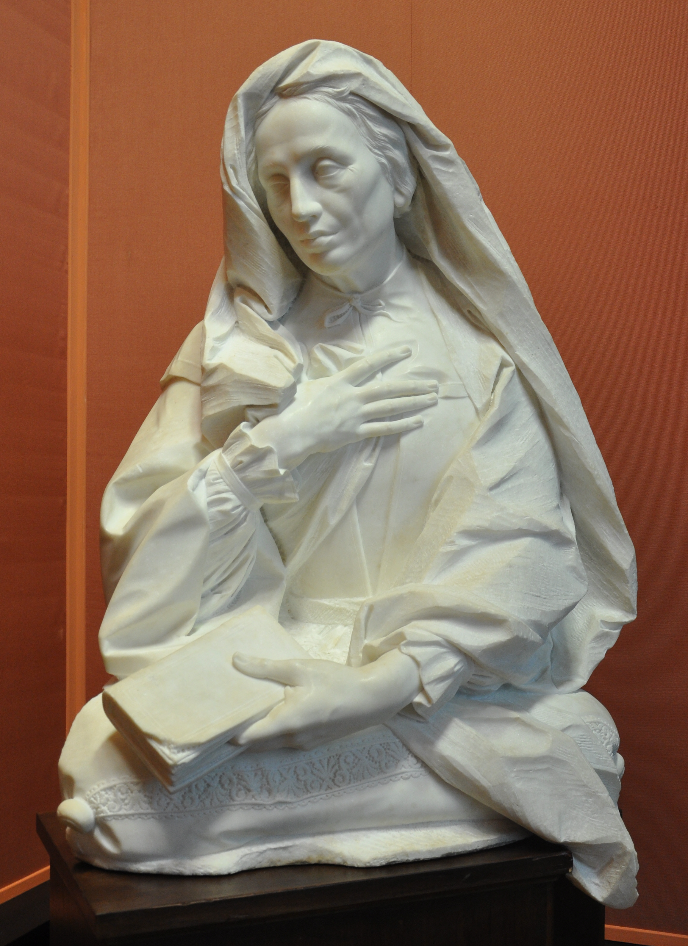 Halbfigur Giulia Albani degli Abati Olivieri, Rom um 1719/1720; Marmor; Höhe 96 cm; Kunsthistorisches Museum Wien, Kunstkammer; Inv.-Nr. KK 9914, siehe auch